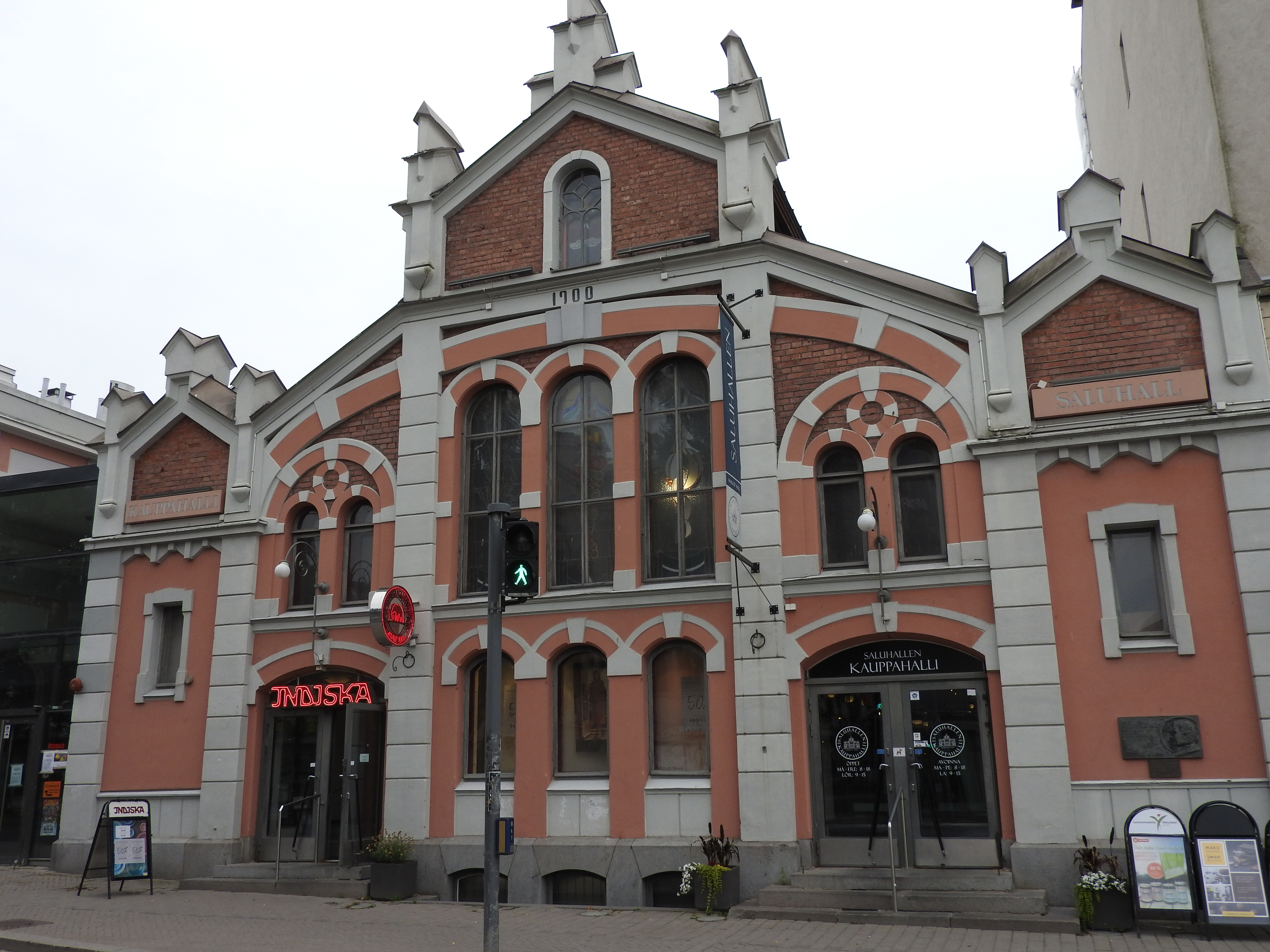 Vaasan kauppahalli vuonna 2017